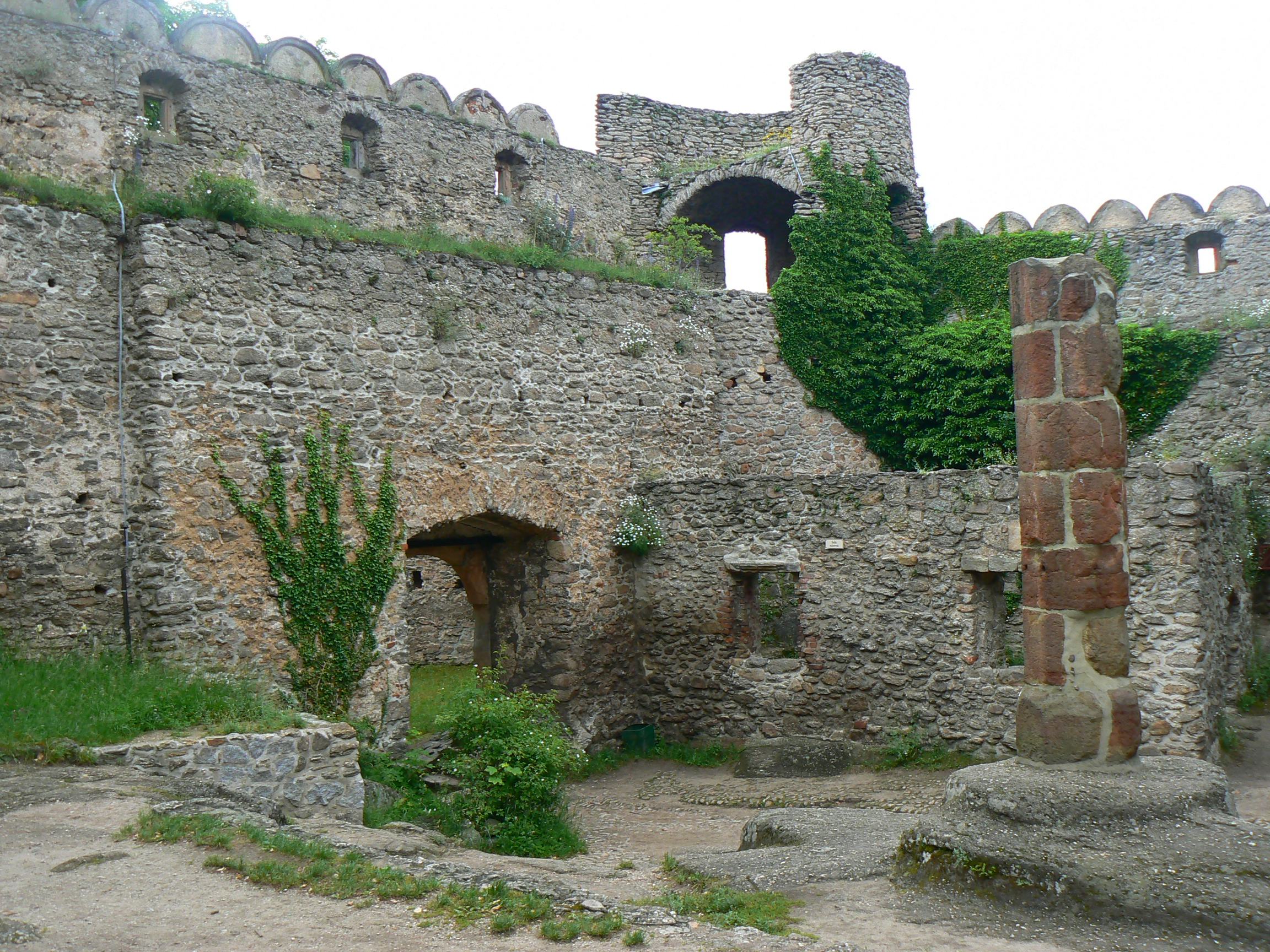 Zamek Chojnik, główny dziedziniec zamkowy (dolny). Z prawej widoczny pręgierz a za nim sala sądowa.